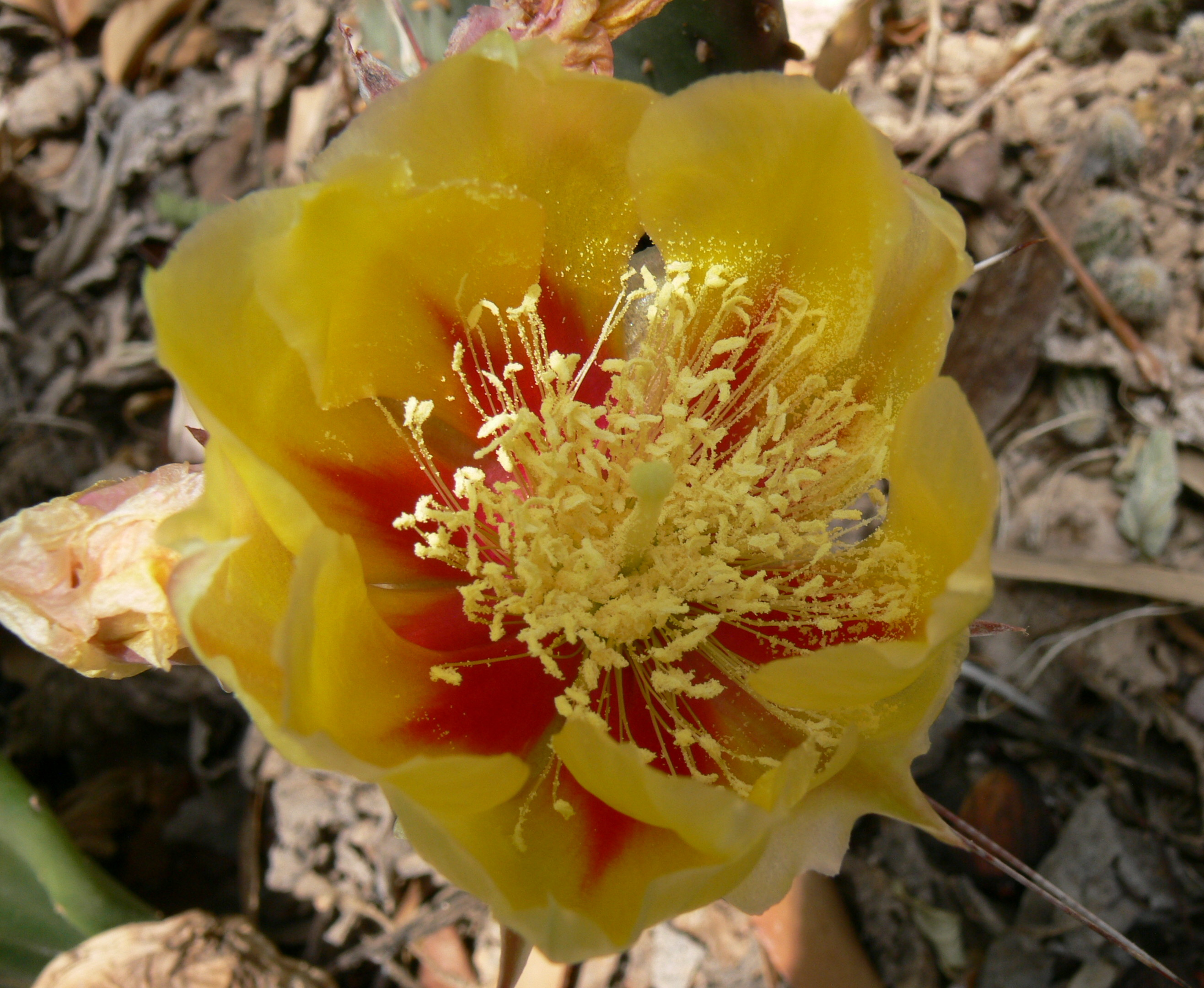 Fleur d' opuntia macrocentra. Cactus originaire du Mexique et des Etats-Unis. Photographie prise en France. Auteurs (authors) Jodelet / Lépinay